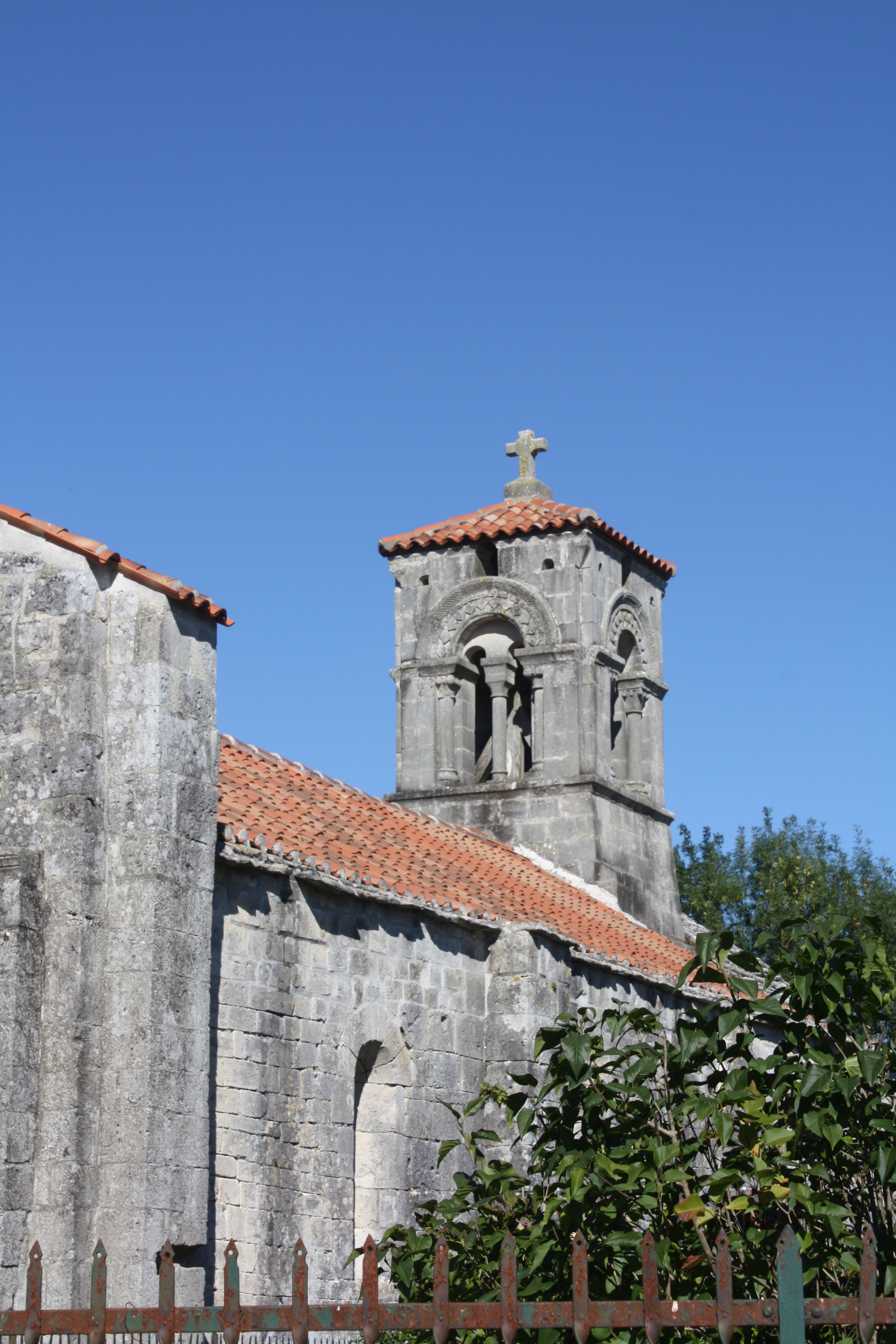 Église Saint-Alban de Saint-Ouen (Inscrit) .